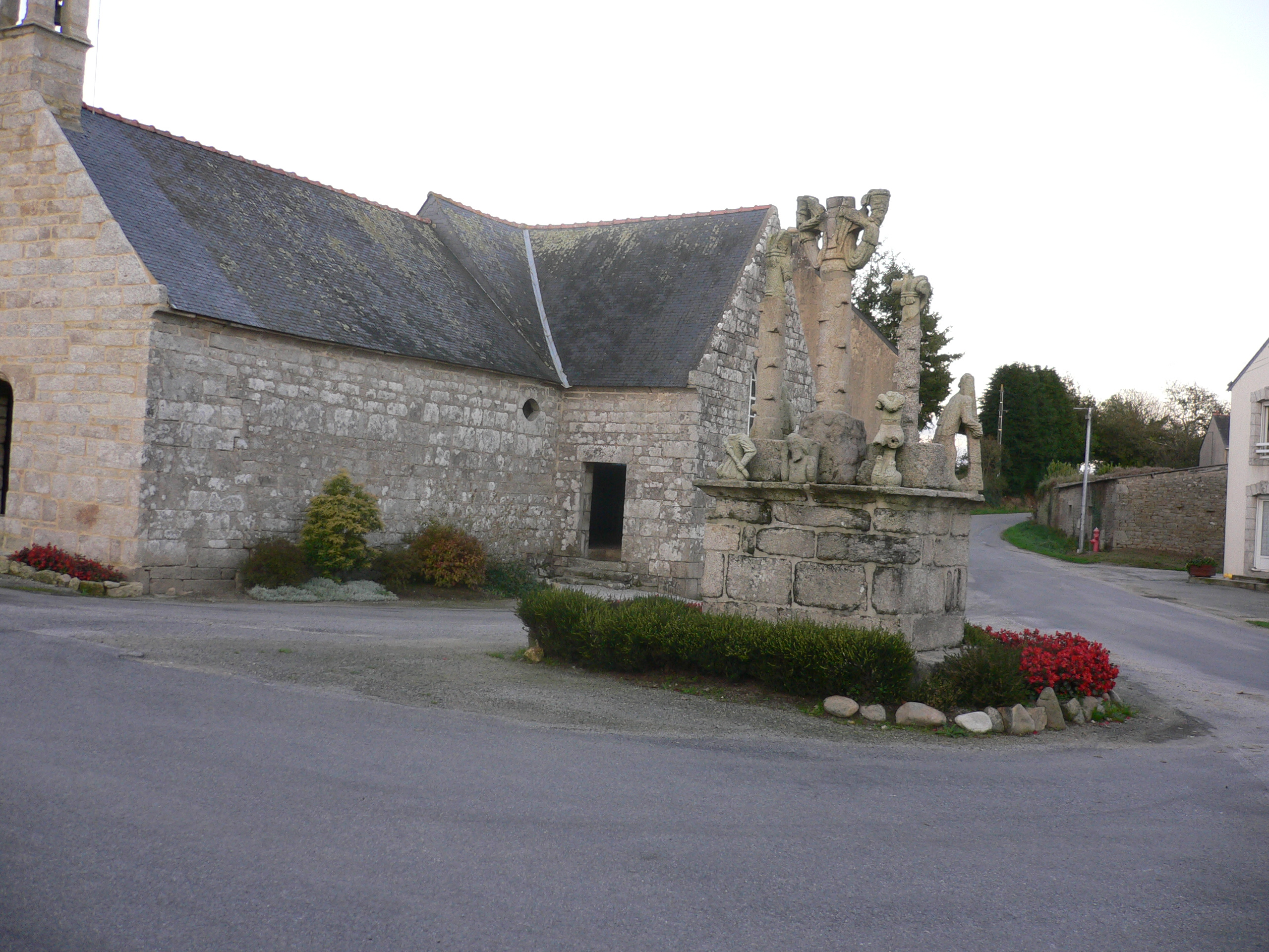 calvaire de Bonigeard